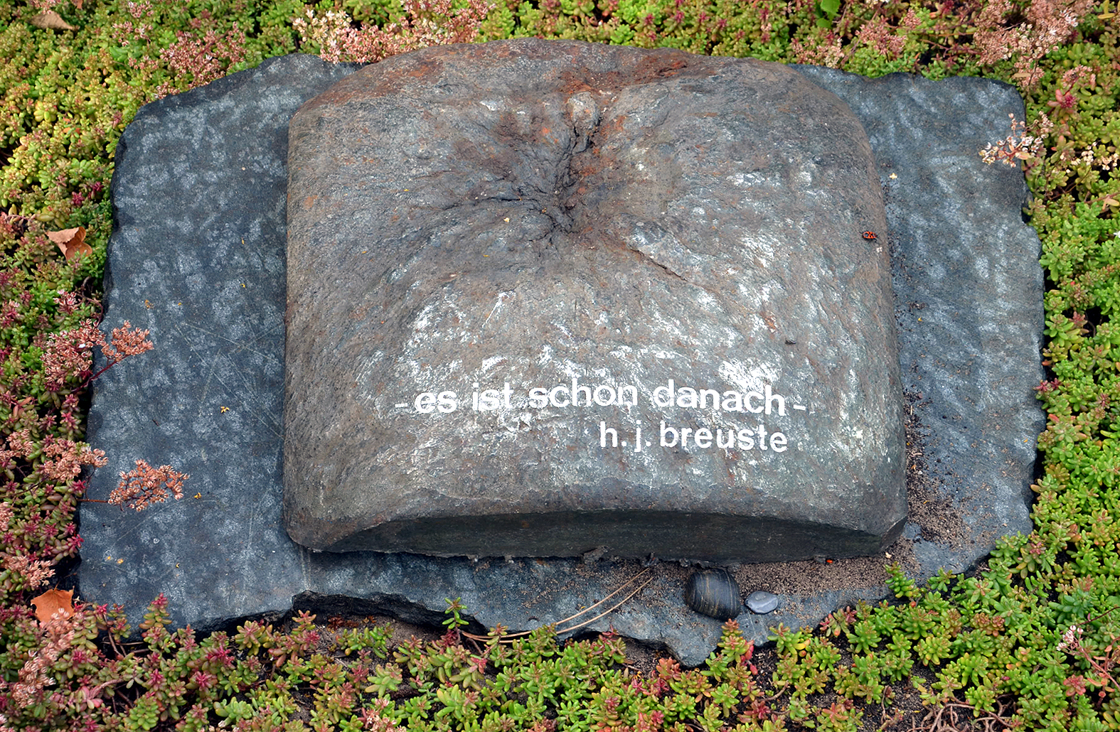 Grabstein für den Bildhauer Hans-Jürgen Breuste (21.05.1933-28.01.2012) mit der Aufschrift „- es ist schon danach - h. j. Breuste“ auf dem Neuen St. Nikolai Friedhof in Hannover-Nordstadt ...